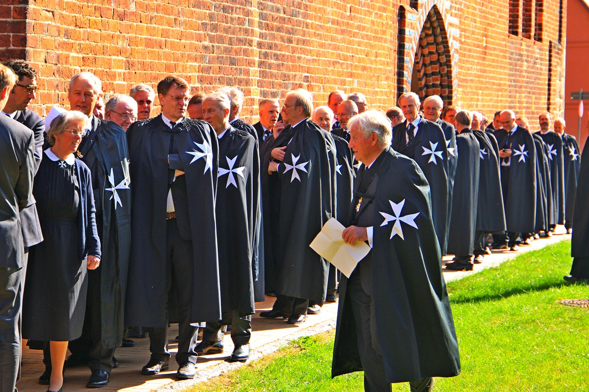 Ritter der Mecklenburgischen Genossenschaft des Johanniterordens vor dem Einzug in die Plauer Kirche